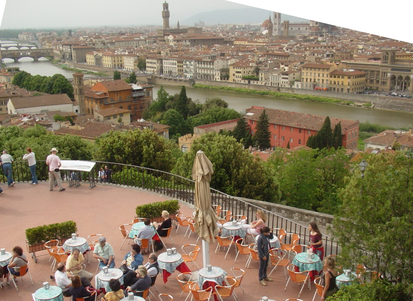 Bu resim, Floransa'da Hasan Sami Bolak tarafından çekildi.